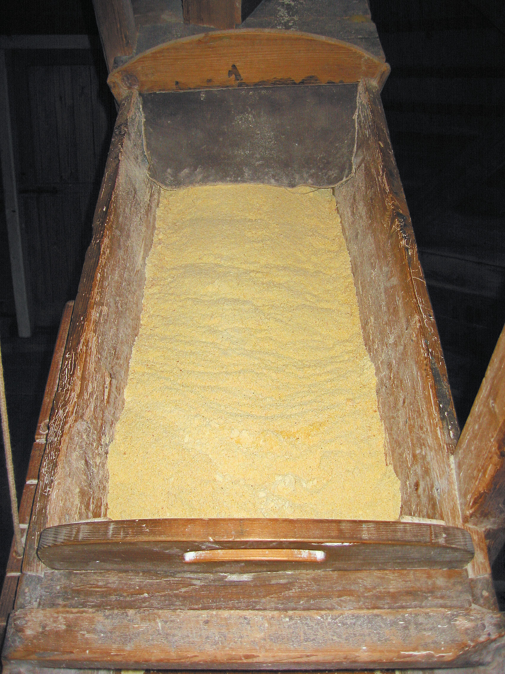 Holztrog mit gemahlenem Mais.